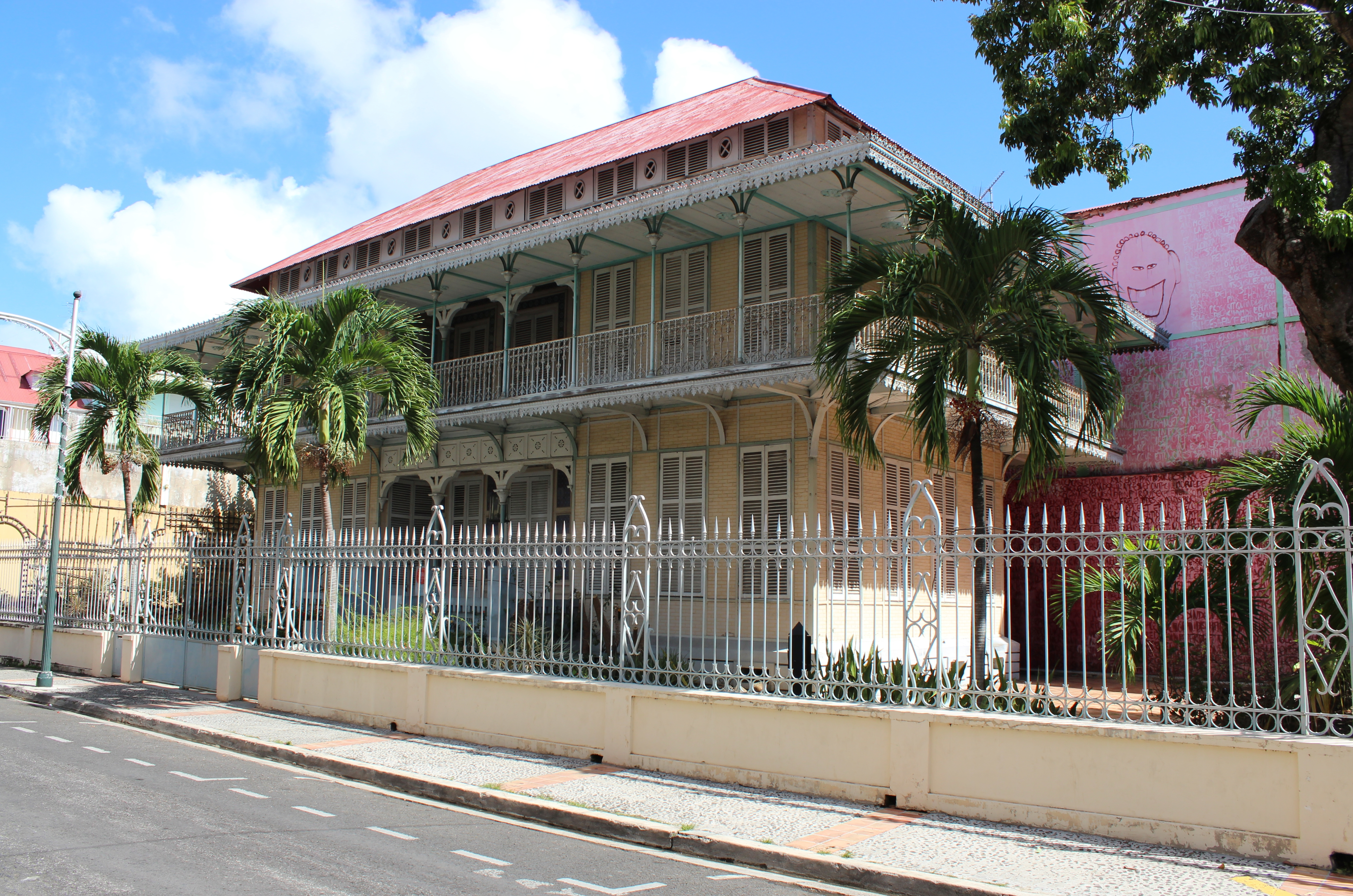 Musée Saint-John Perse, 9 rue de Nozières (Classé, 1979) .